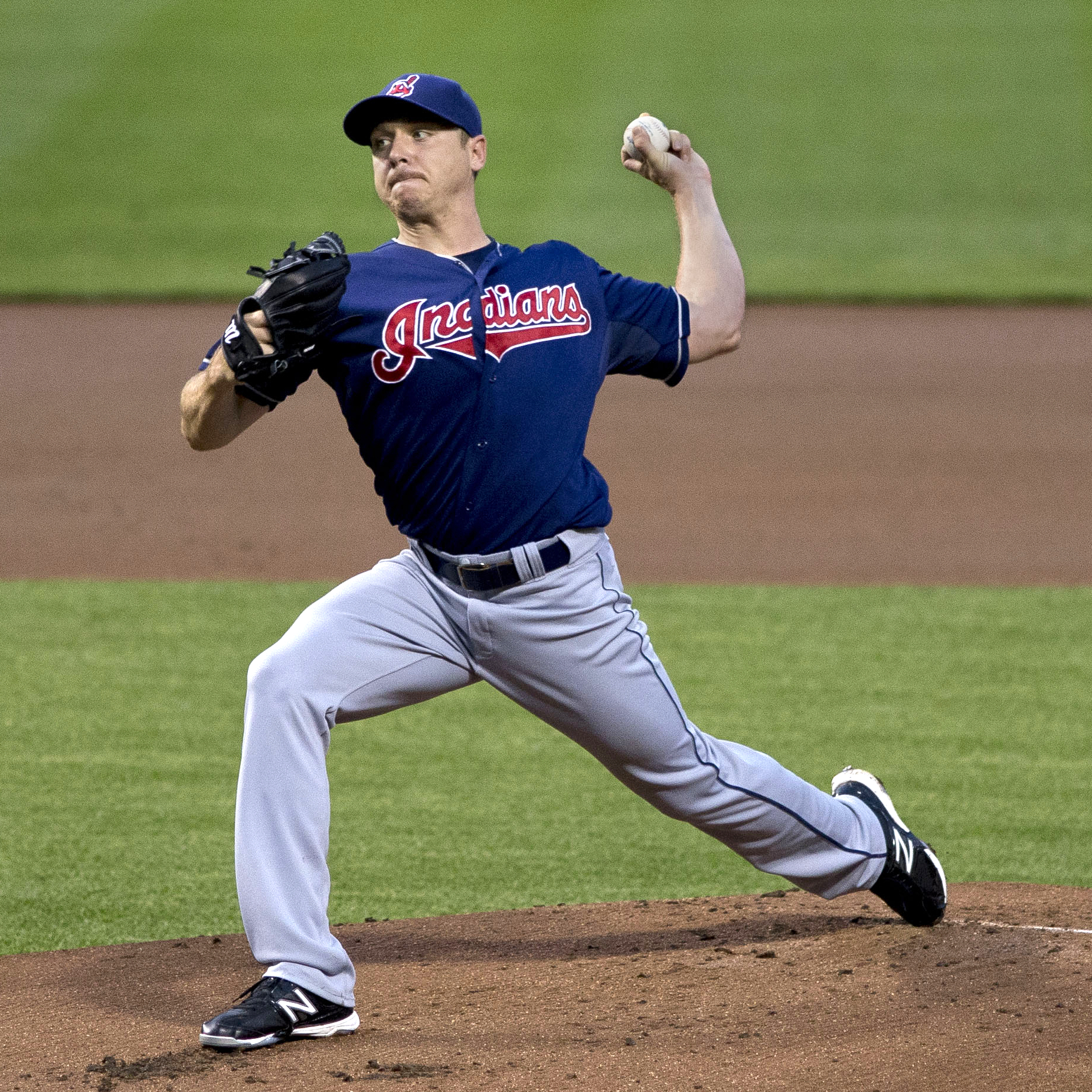 Scott Kazmir